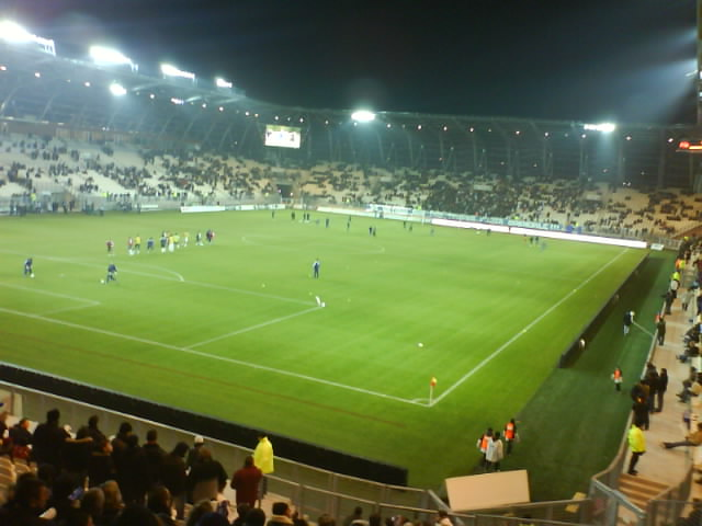 Match Grenoble-Clermont-Ferrand au Stade des Alpes le 15/02/2008.